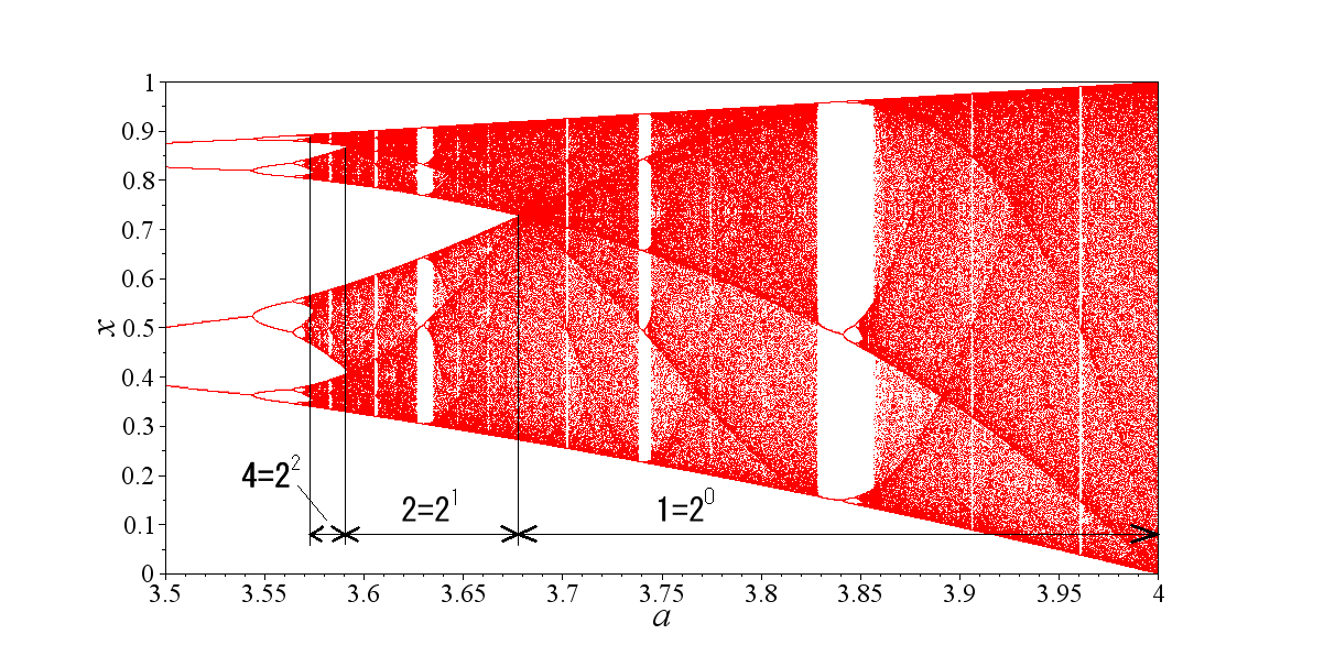 ロジスティック写像分岐図、パラメータaが3.5から4まで、バンドの数を1,2,4まで示す。